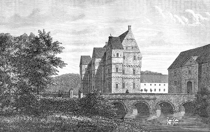 Borreby er en befæstet herregård i Magleby Sogn ved Skælskør på Sydsjælland.